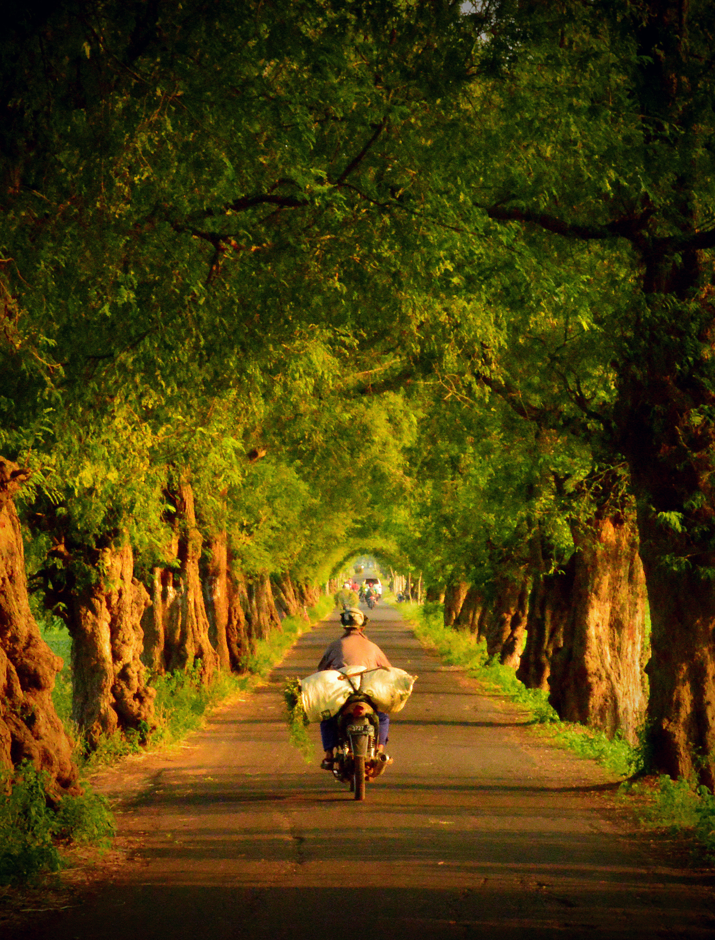 Seorang petani di Montong membawa hasil panennya untuk dibawa pulang. Sore hari adalah waktu pulang para petani di Montong dan membawa hasil panen setelah bekerja mulai siang hari.